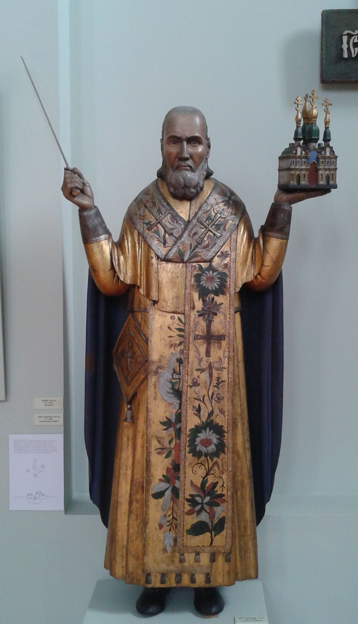 Св.Николай Можайский из д.Зеленята. Кон. XVIII - нач. XIX вв.